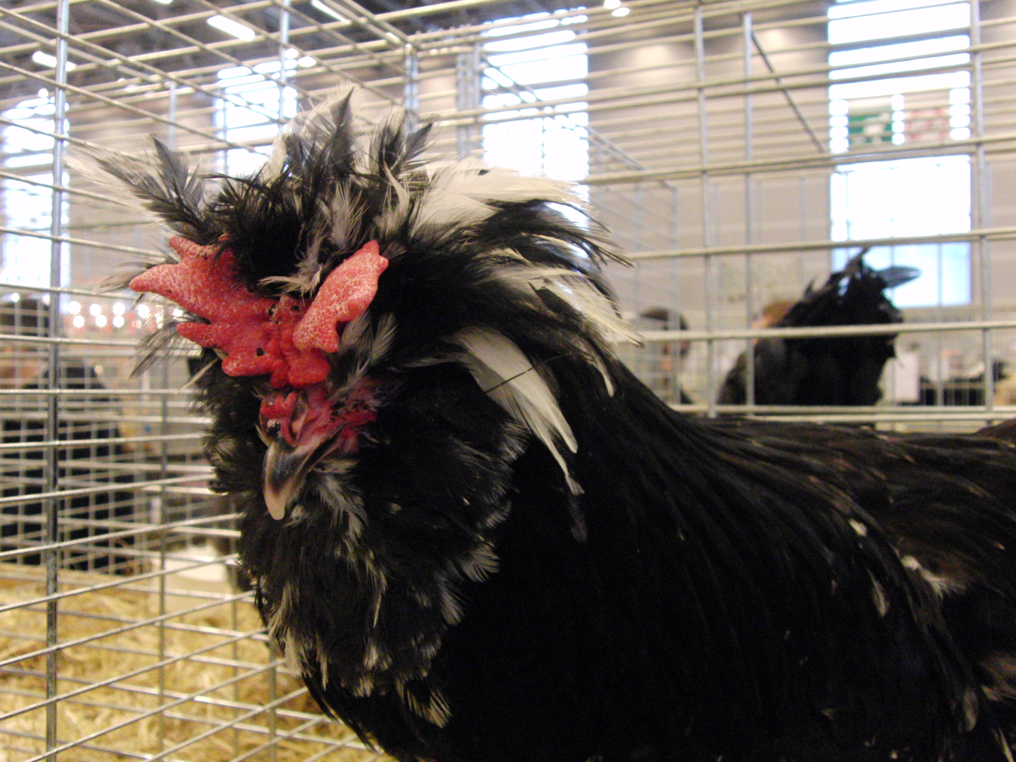 Tête d'un coq Houdan - Salon international de l'agriculture 2013, Paris, France